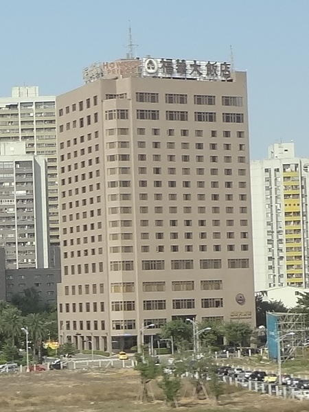 中文（台灣）: 從臺灣高鐵南下列車拍攝臺中福華大飯店。